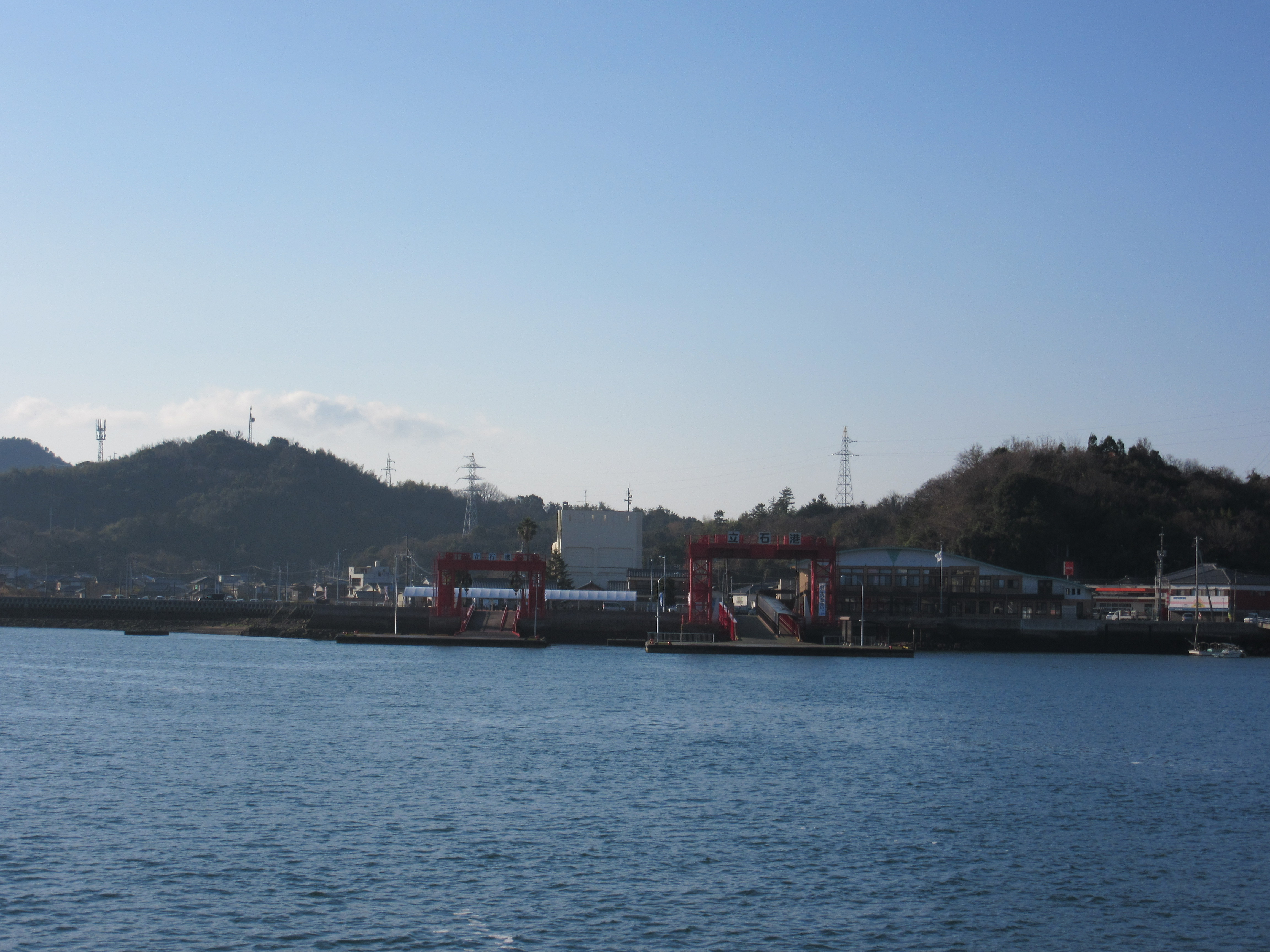 立石港全景